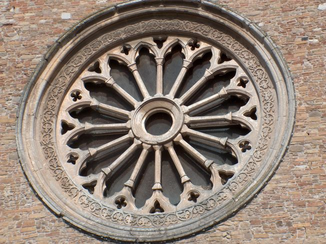 Rosone chiesa di San Francesco a Lucera